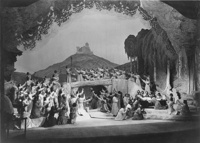 Scherl: Von den Bayreuther Festspielen 1930. Tannhäuser Schlusszene.